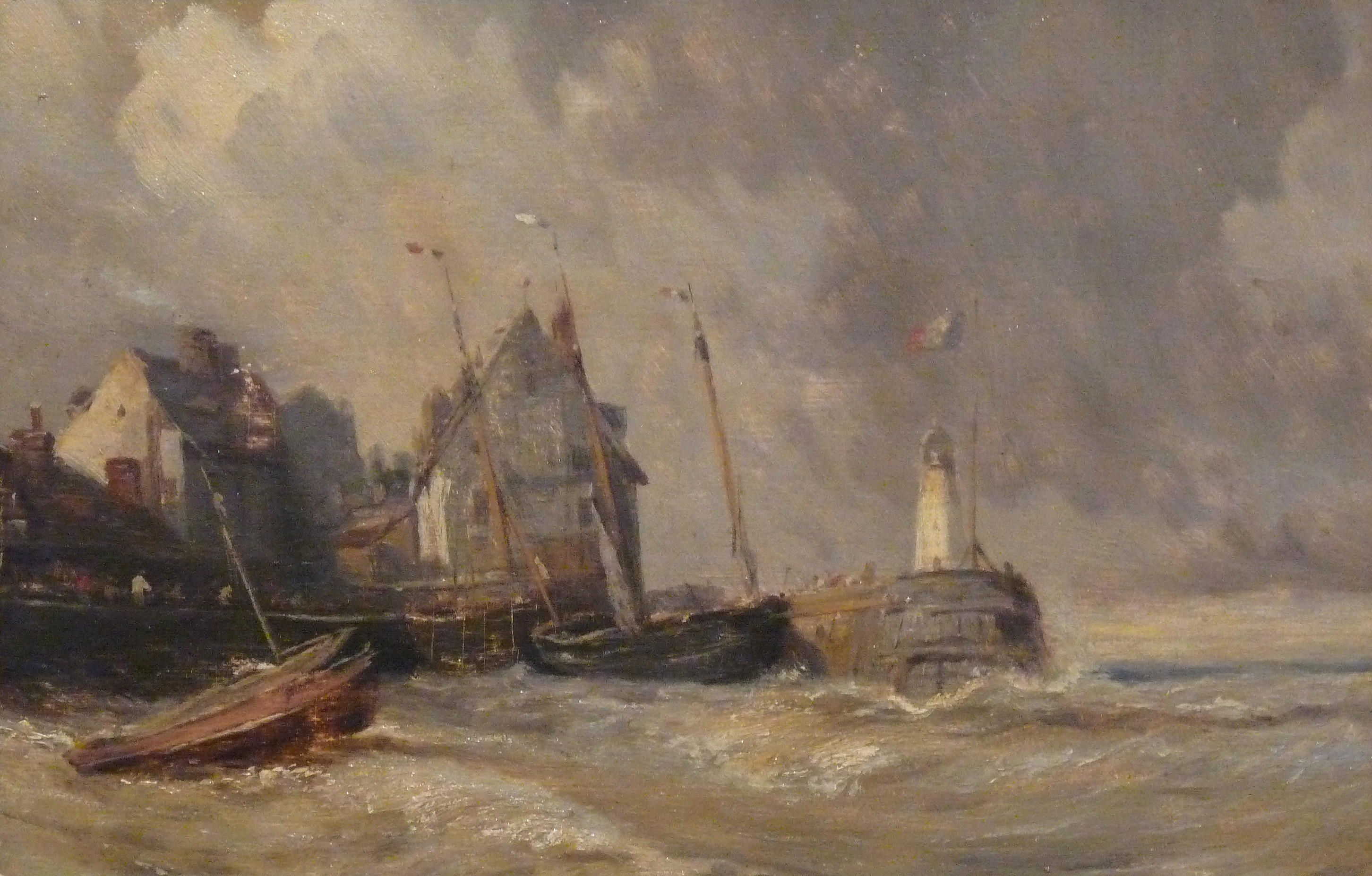 Marine